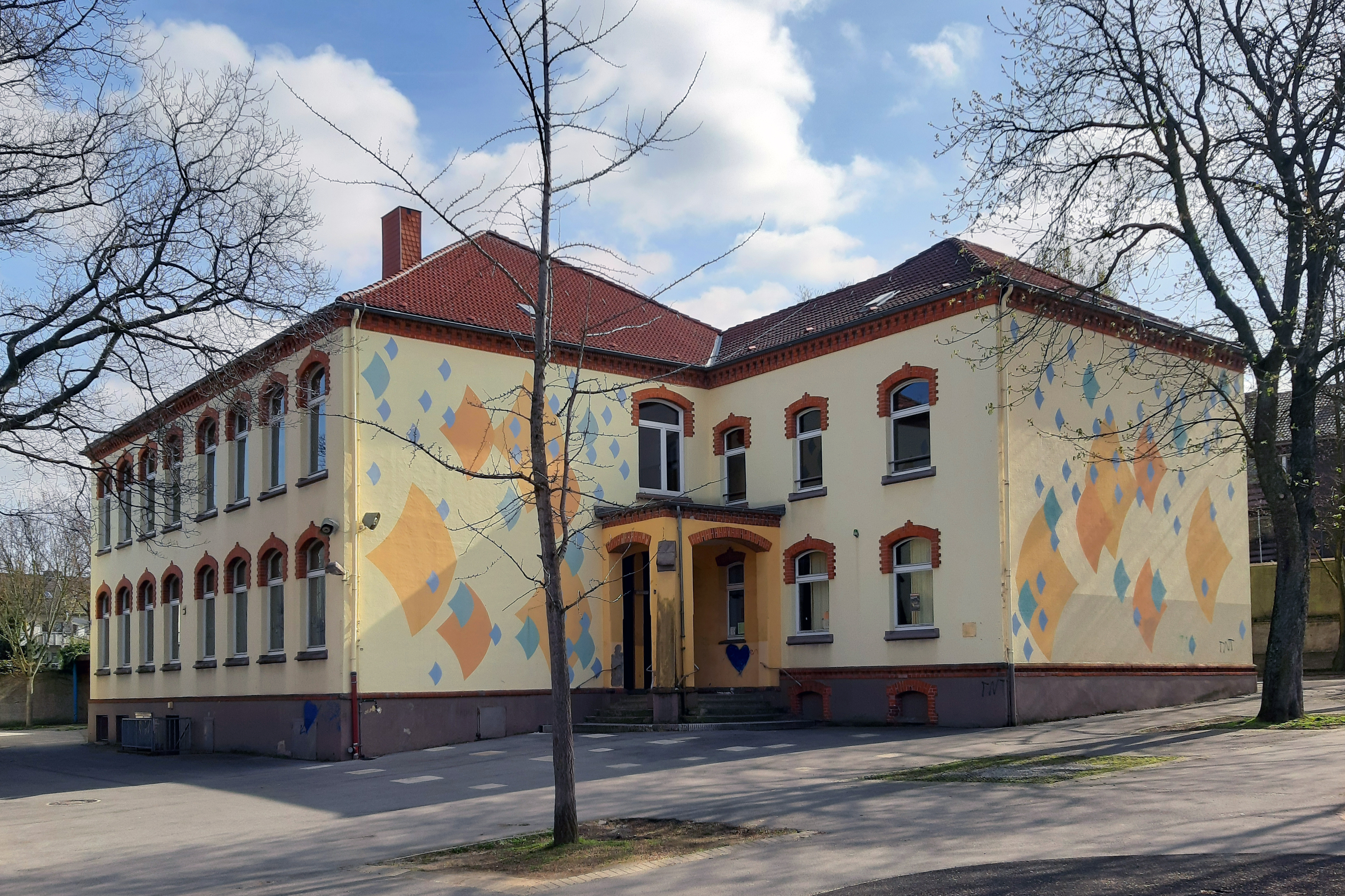 Walter-Pleitgen-Grundschule in Essen-Frintrop, 2013 geschlossen